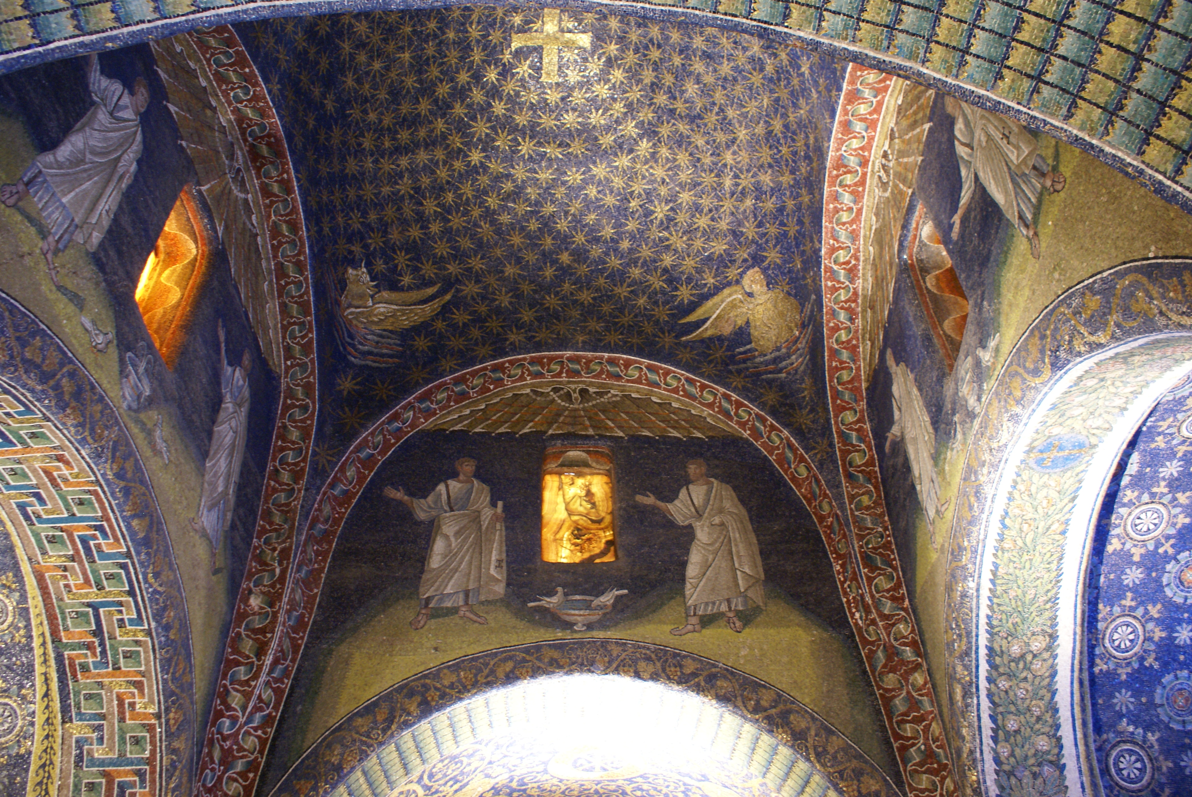 Mausoleo di Galla Placidia This is a photo of a monument which is part of cultural heritage of Italy.